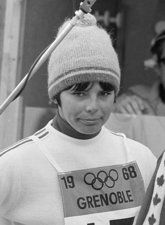 Annie Famose